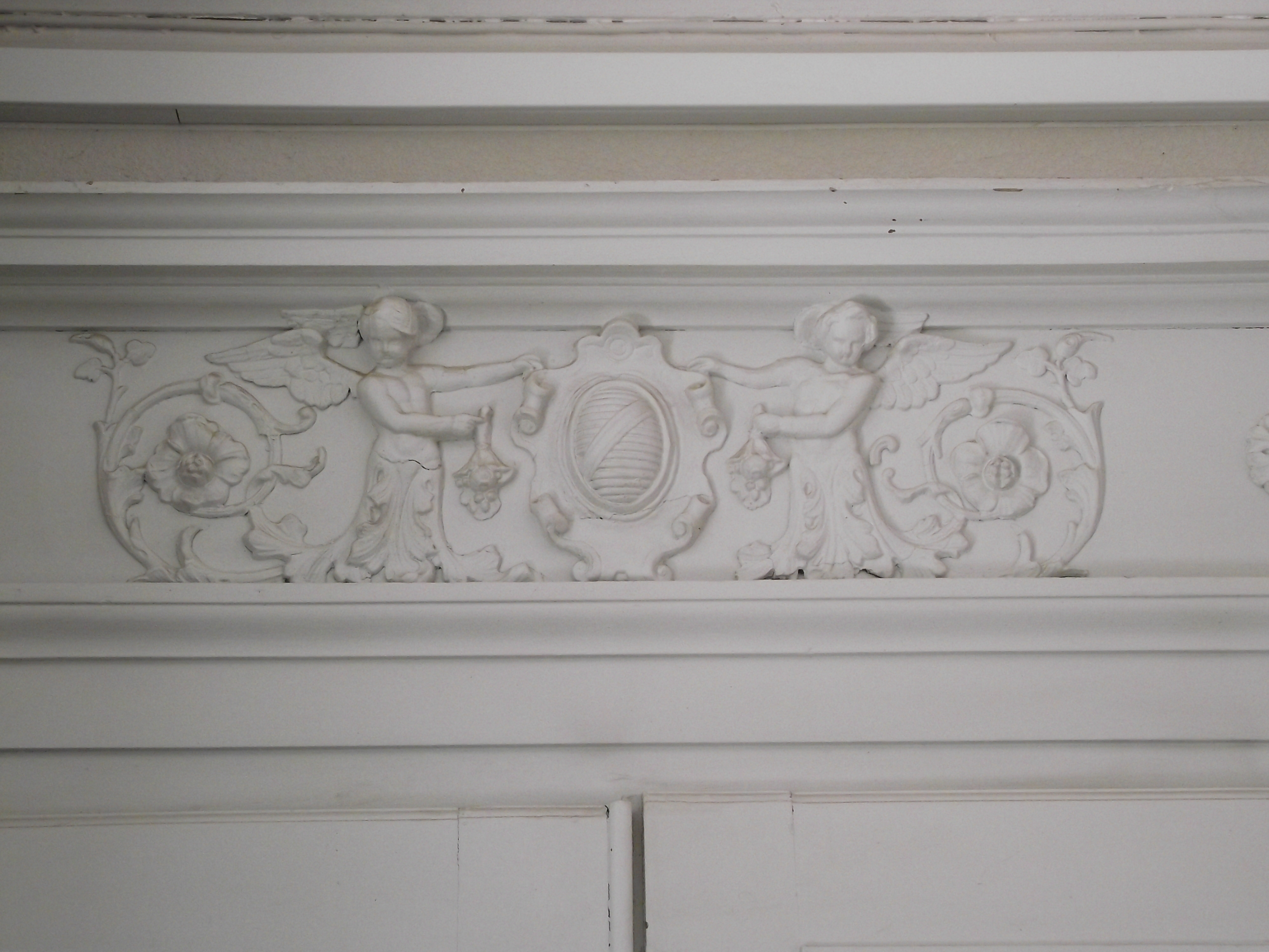 Rinceau à putti ailés portant l'écu aux armes de J.S. Chambert-Péan. Hall de l'escalier, bâtiment Hugo (ancienne villa Saint-Lazare), lycée Augustin-Thierry de Blois.